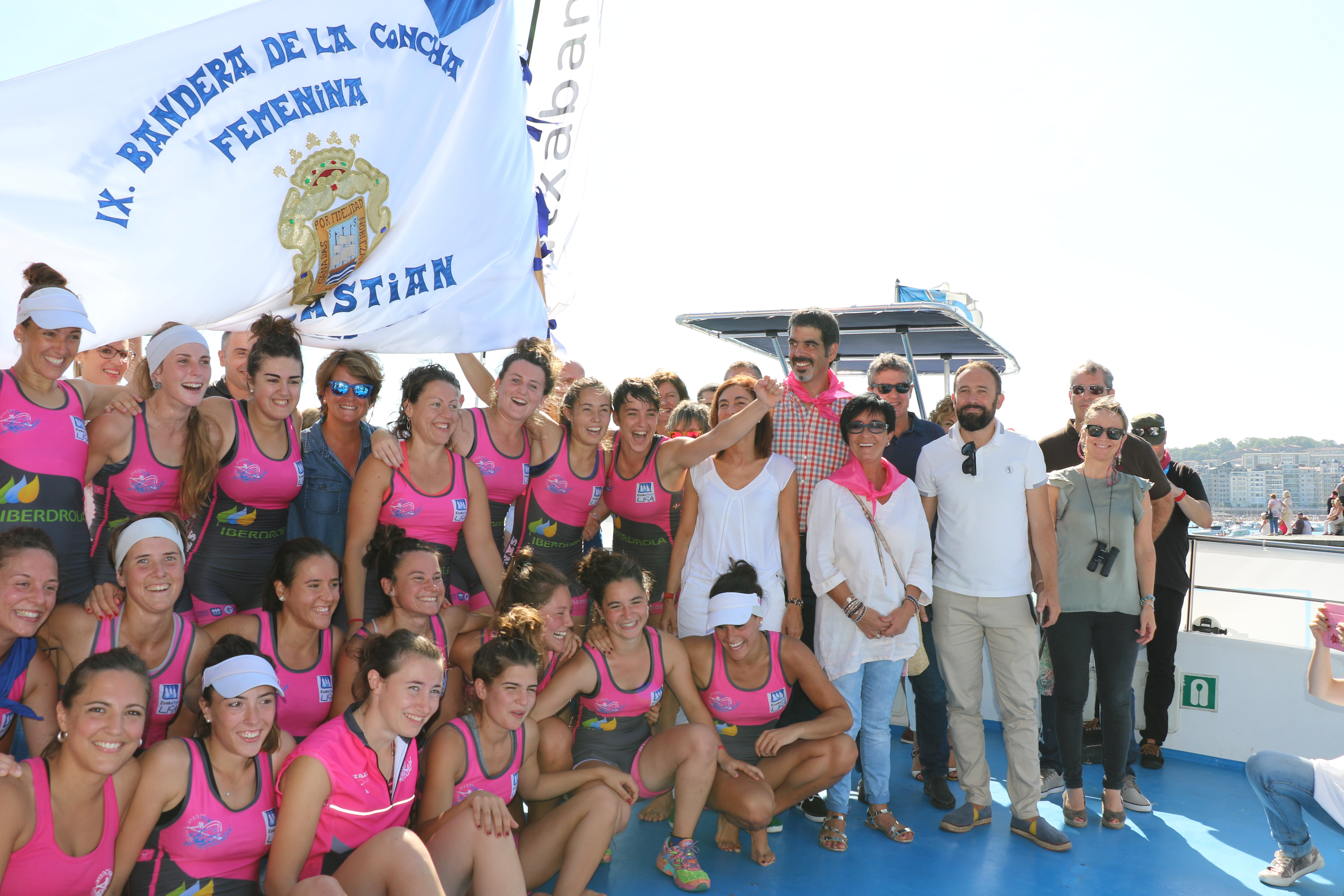 Batelerak-2